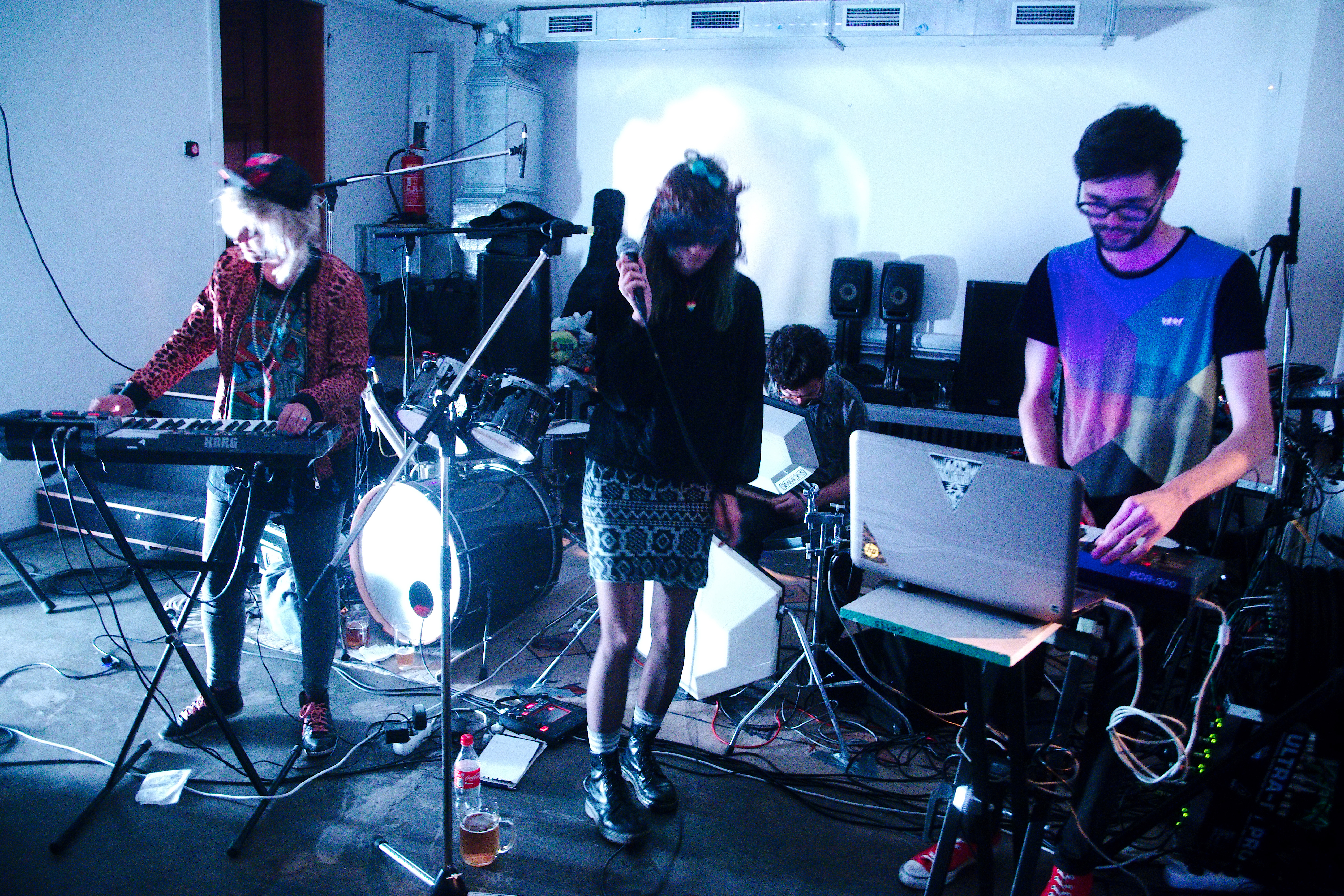 Piča z hoven, 19. 6. 2015, PRAHA / Fórum pro architekturu a média (Brno)